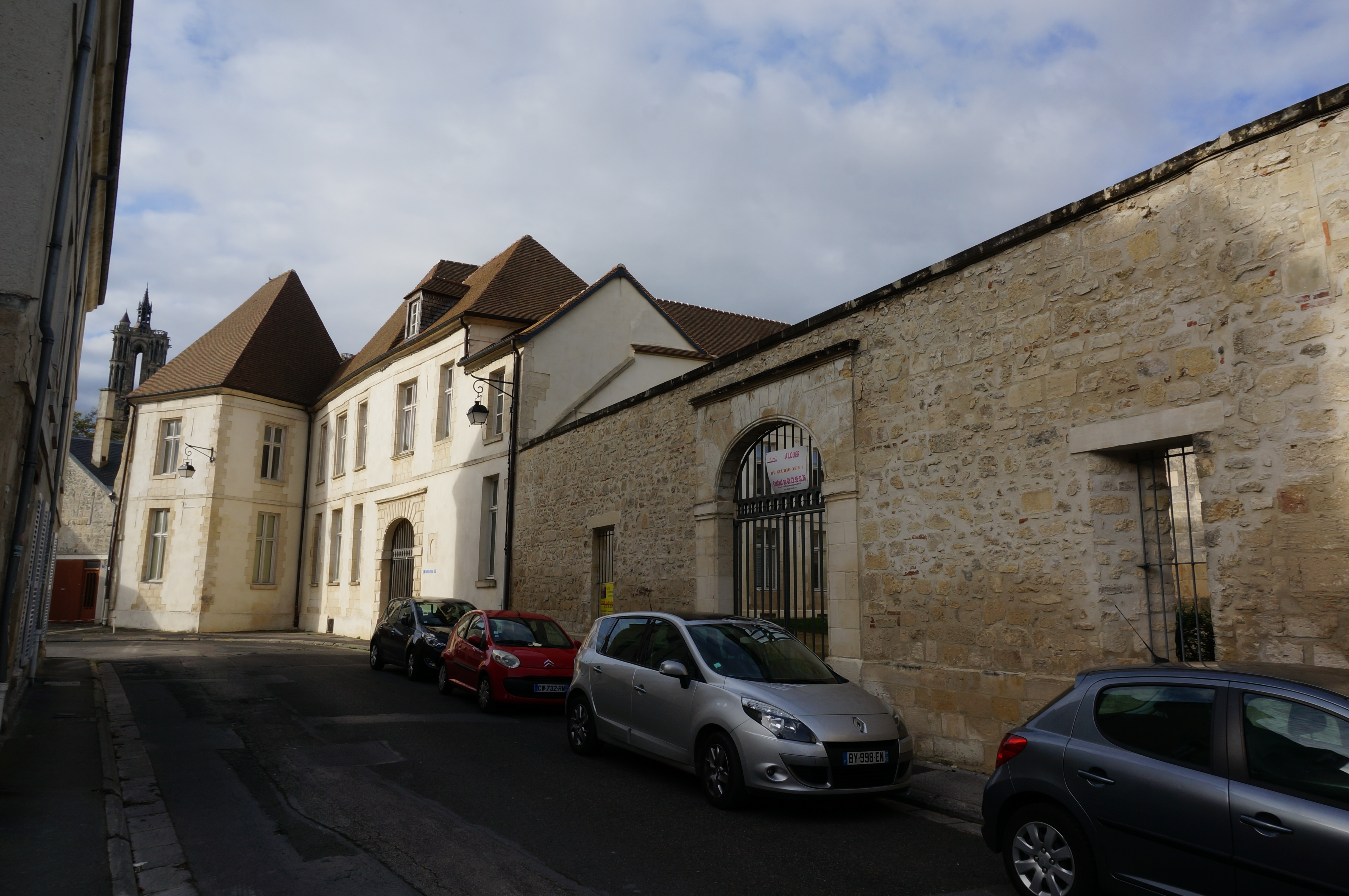 vue de l'ancien séminaire de Laondepuis la rue de st-Pierre au marché.